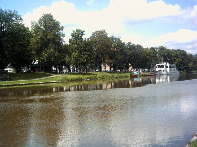 Zastarala lod na Labi v Hradci Kralove, Cechie